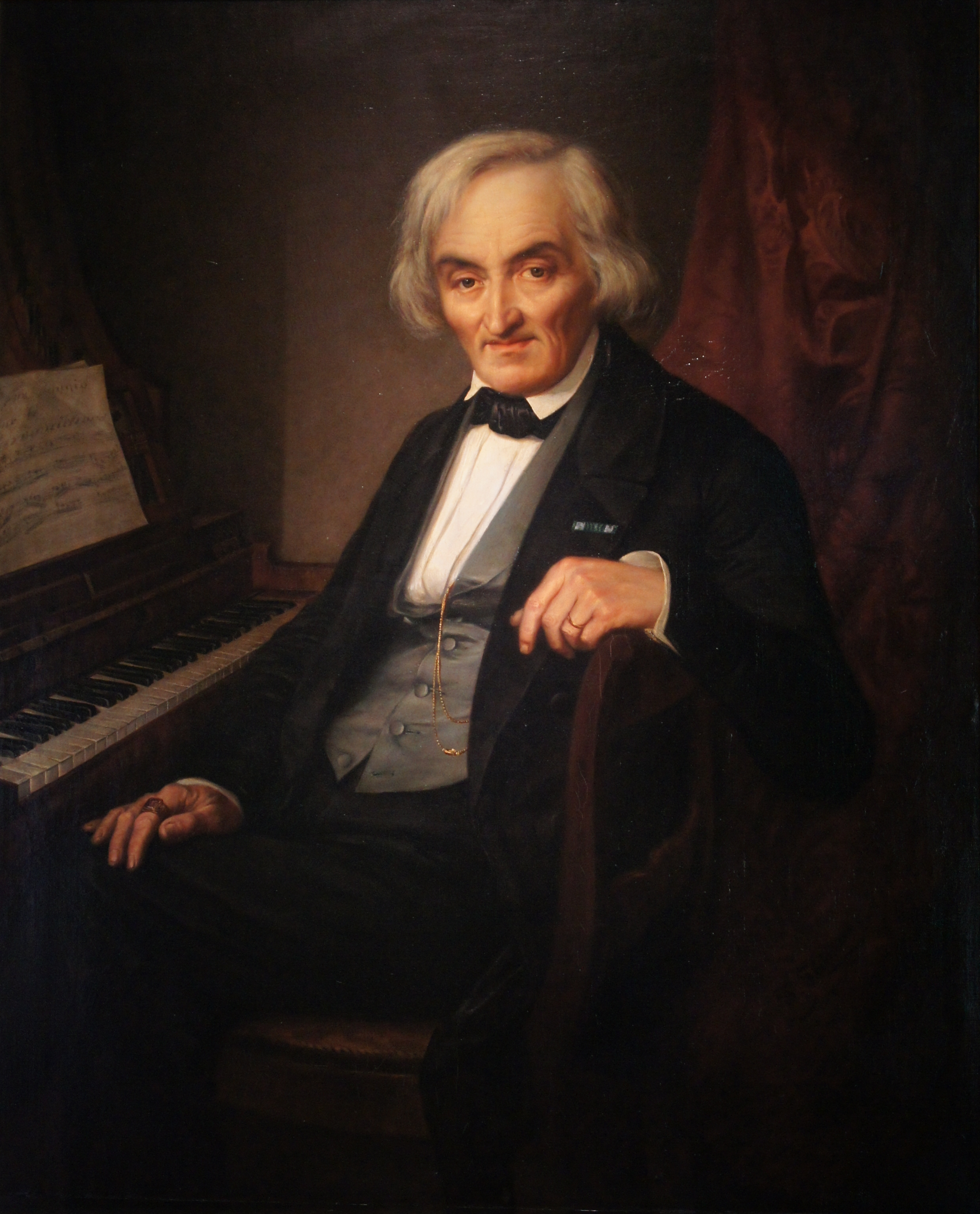 Johann Friedrich Kaufmann. Öl auf Leinwand. Gemälde im Kulturhistorischen Museum, Neißstraße 30 in Görlitz